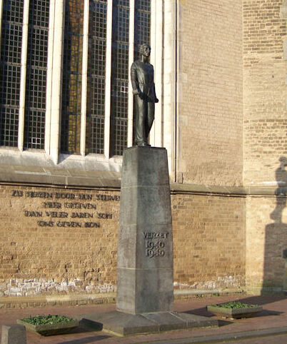 Verzetsmonument, Grote Kerkhof in Deventer.